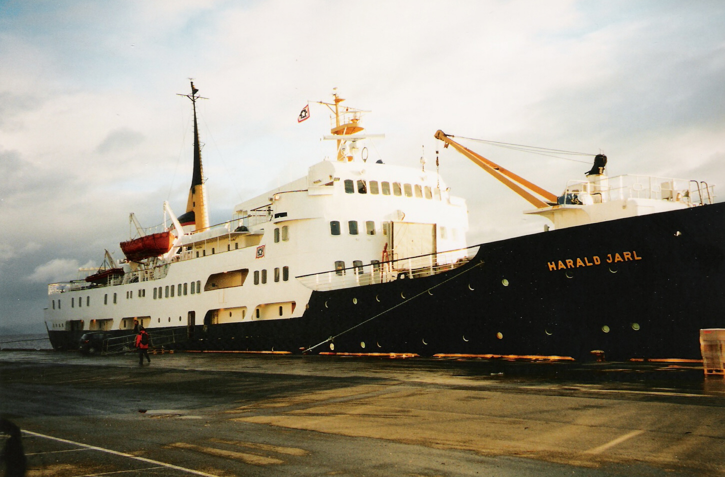 Postschiff Hurtigruten